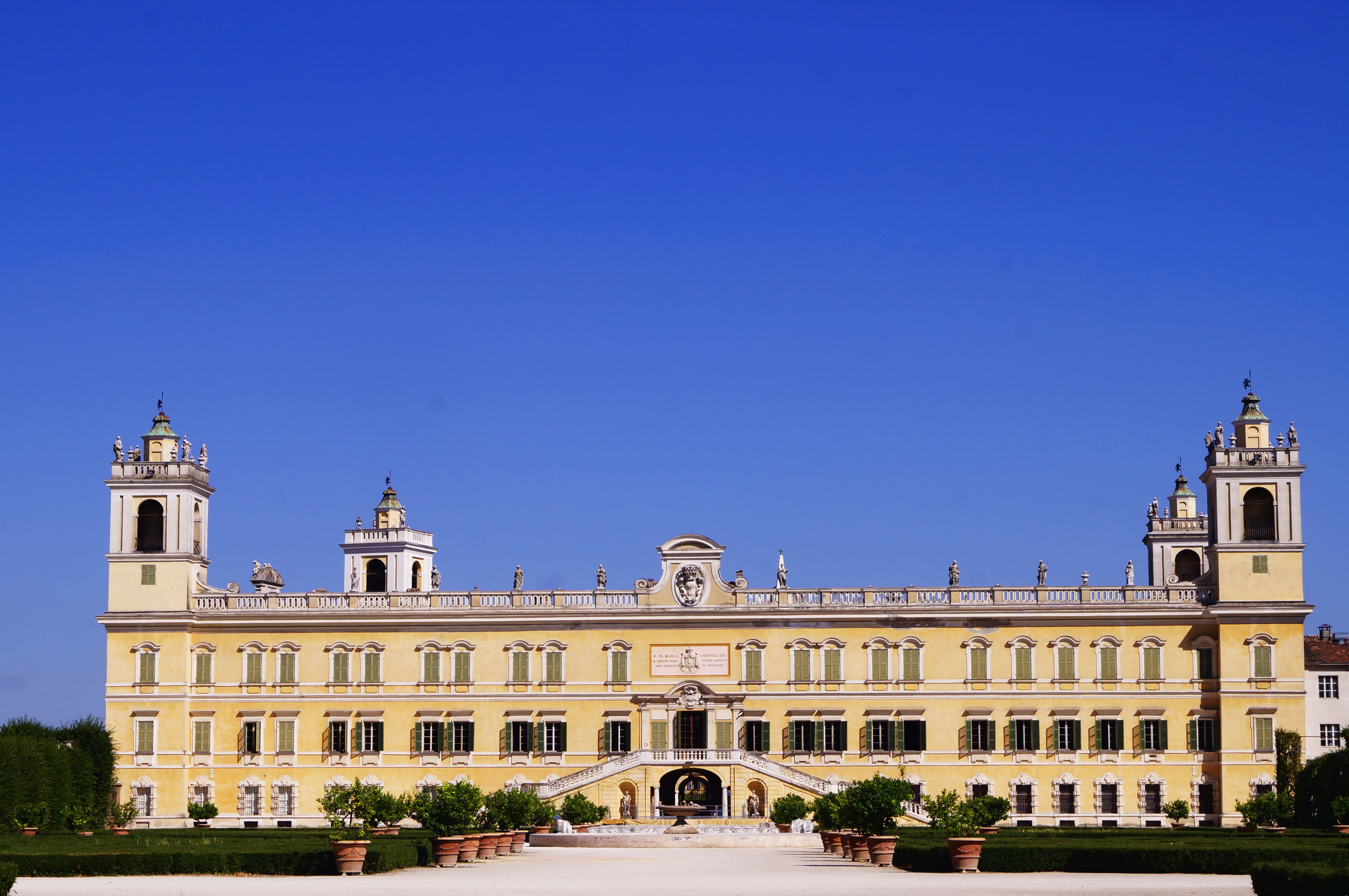 Reggia di Colorno This is a photo of a monument which is part of cultural heritage of Italy.